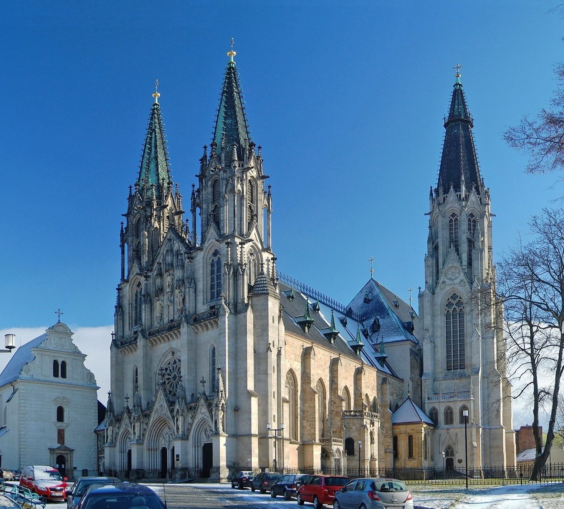 Dóm Svatého Václava, Olomouc